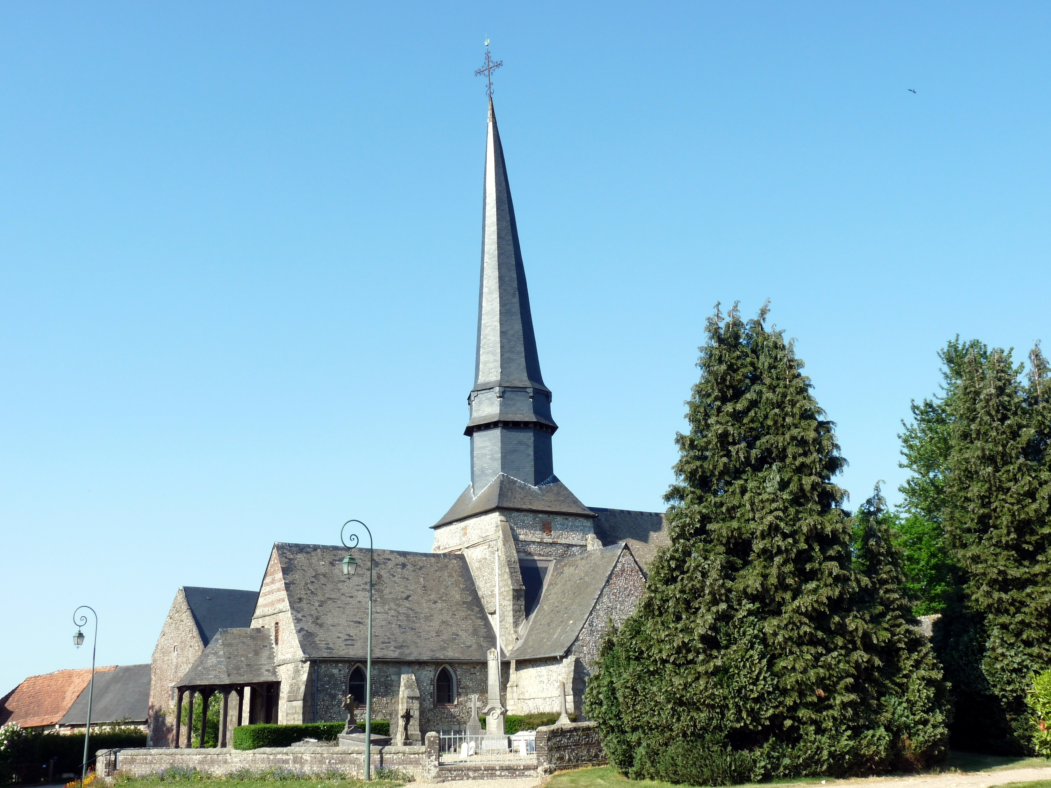 Église Saint-Nicolas de Pommeréval (Inscrit) .